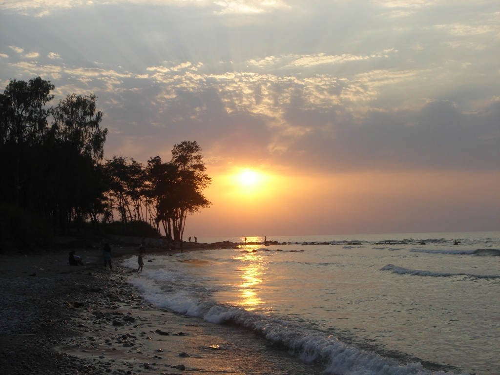 ساحل جنگل سی سنگان